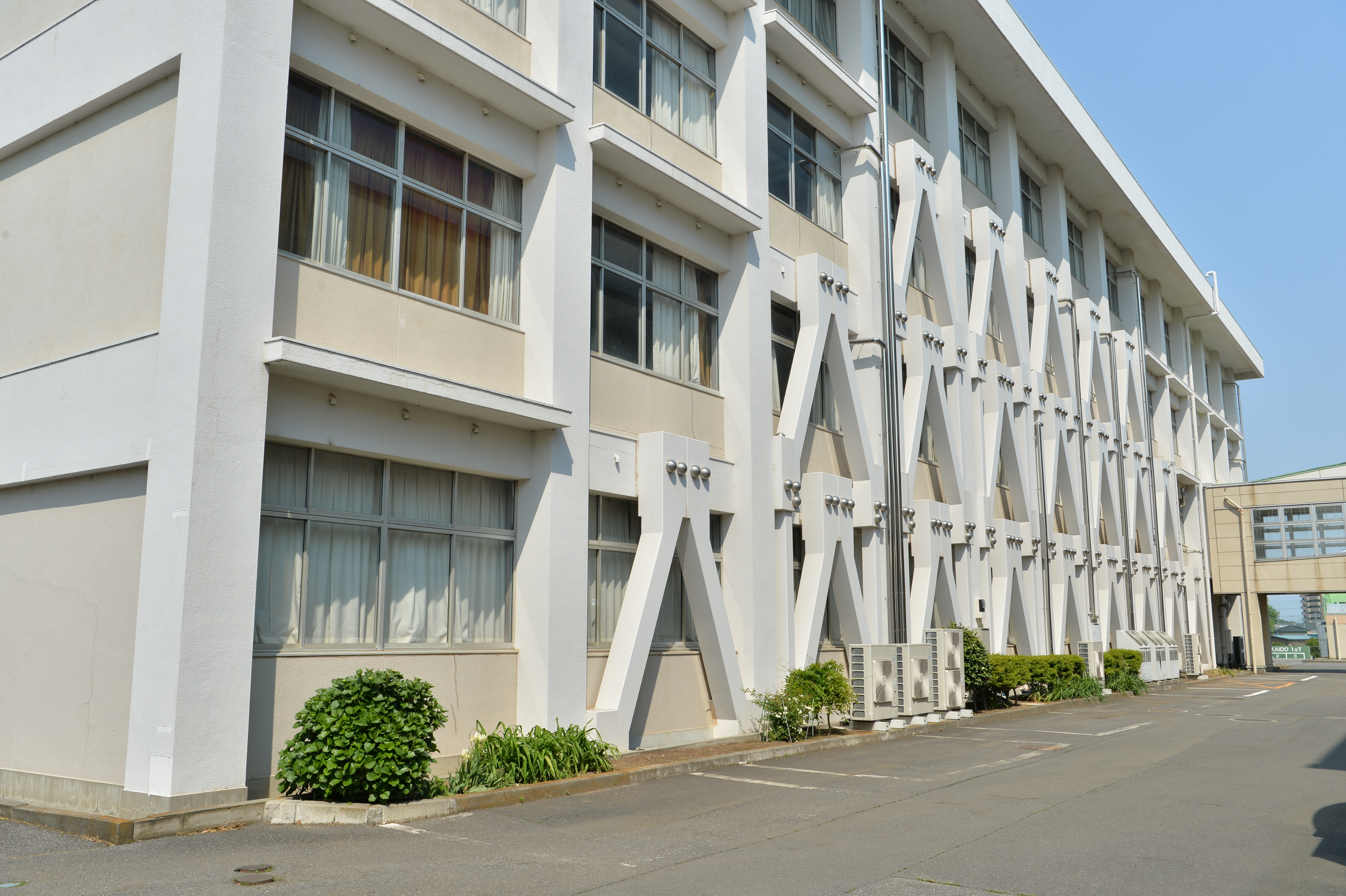 4階建て。旧本館とともに創立70周年記念事業の一環として建設。